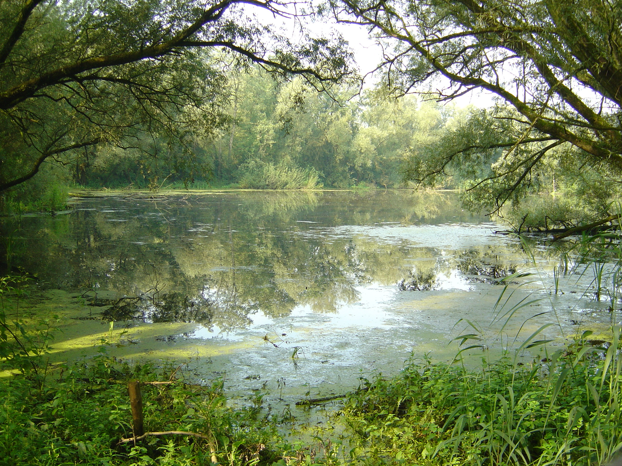 Ooibos in natuurontwikkelingsproject Duursche Waarden aan de IJssel bij Olst, Overijssel. Een oud ooibos met zowel zachte als harde houtsoorten. Plaatselijk bekend als 'Korea' vanwege de moeilijke doordringbaarheid